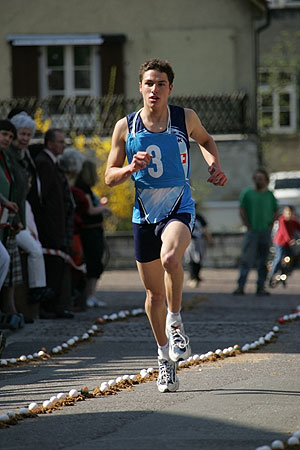 Eierleset in Arlesheim: Läufer und Eierwerfer